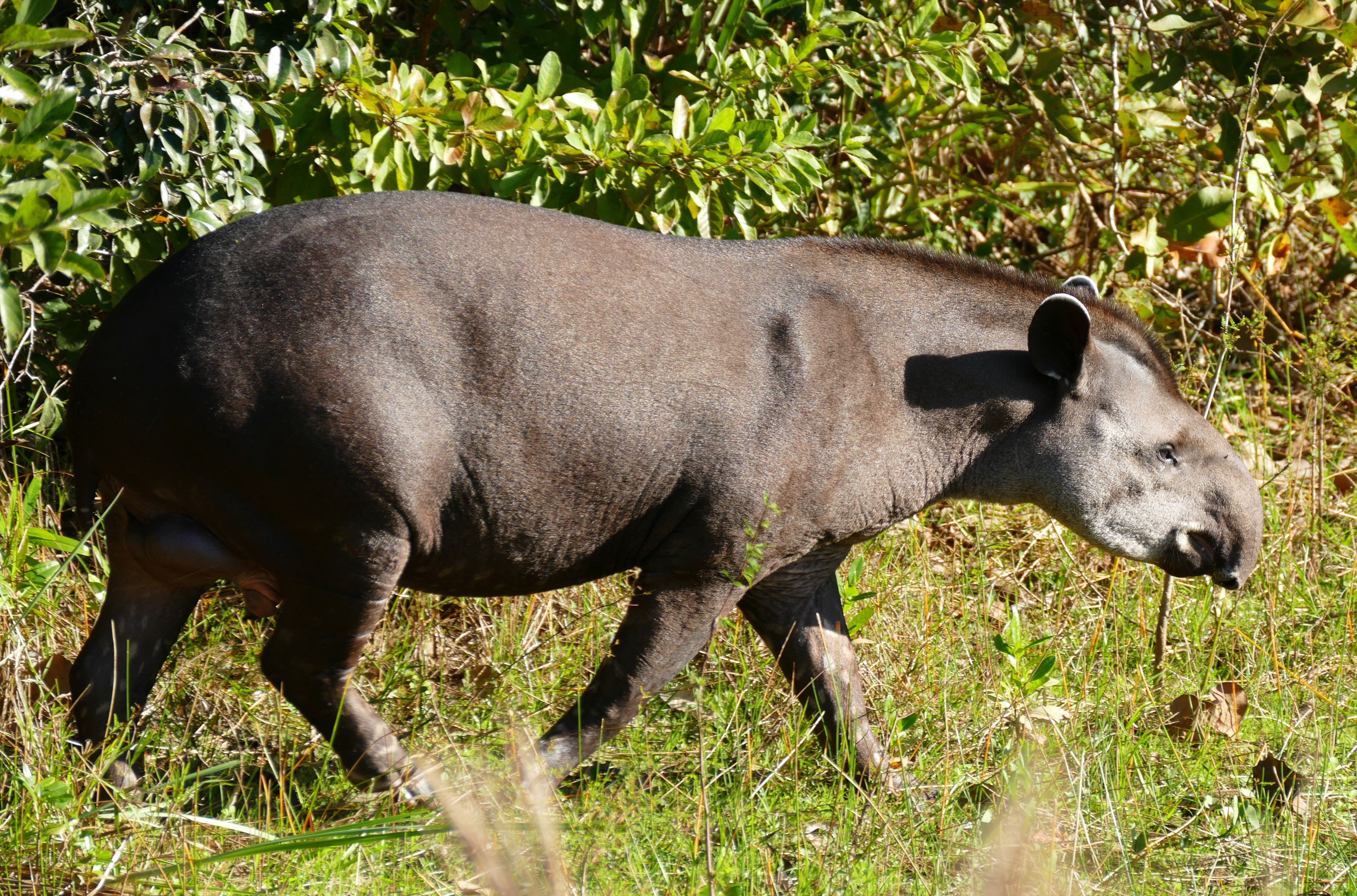 Pouso Alegre, Transpantaneira, Poconé, Mato Grosso, BRAZIL